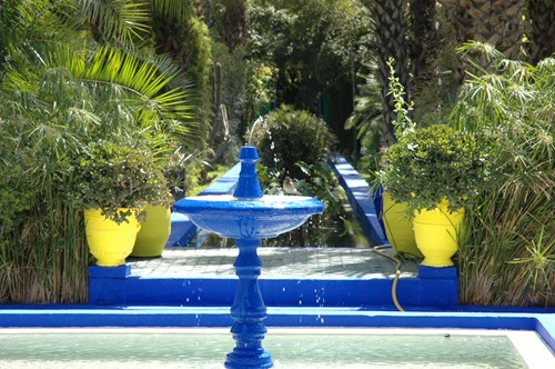 Marràqueix - Jardins Majorelle